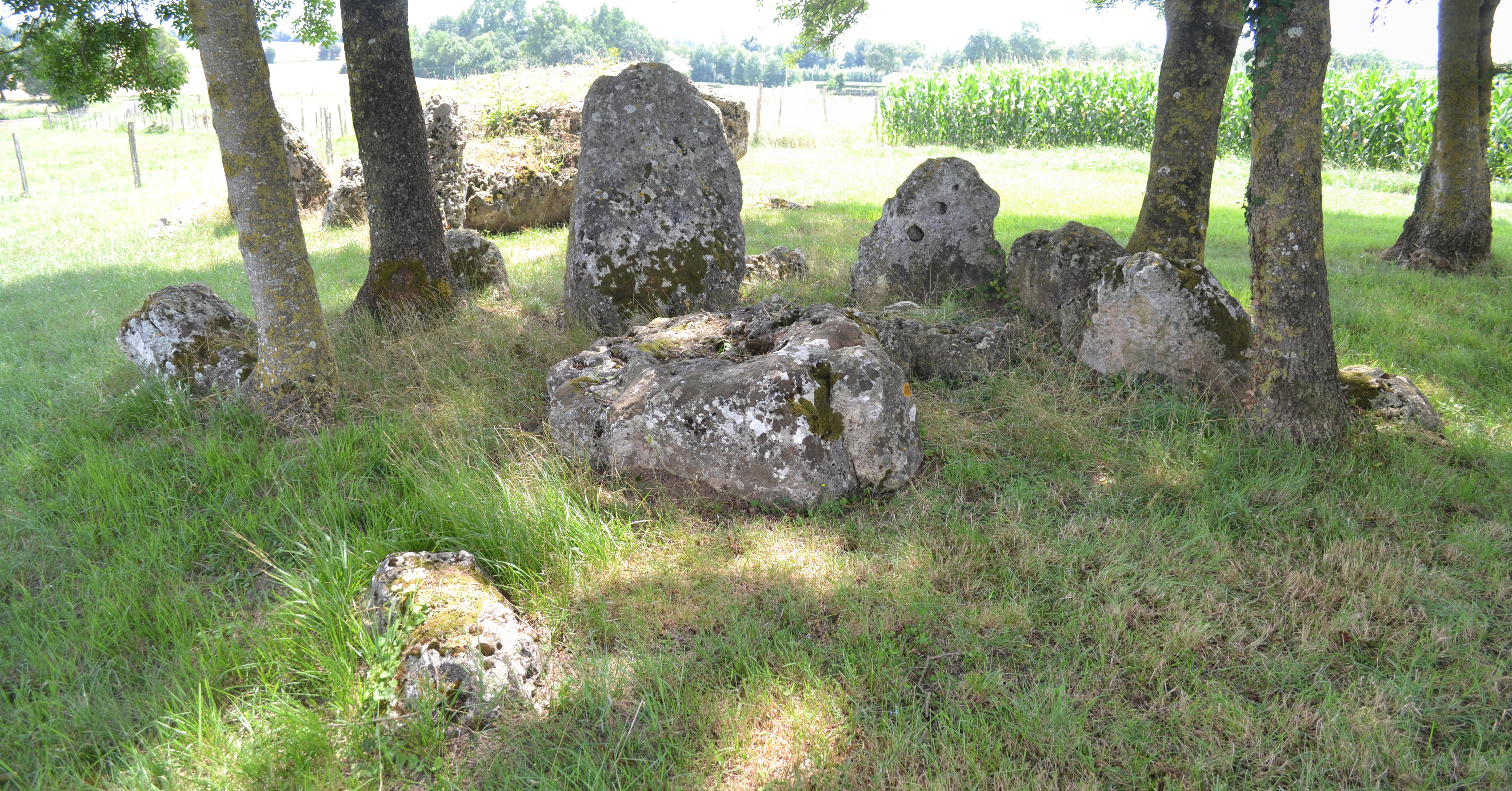 Dolmens n°2 de la Pierre Levée à La Vallée (17).